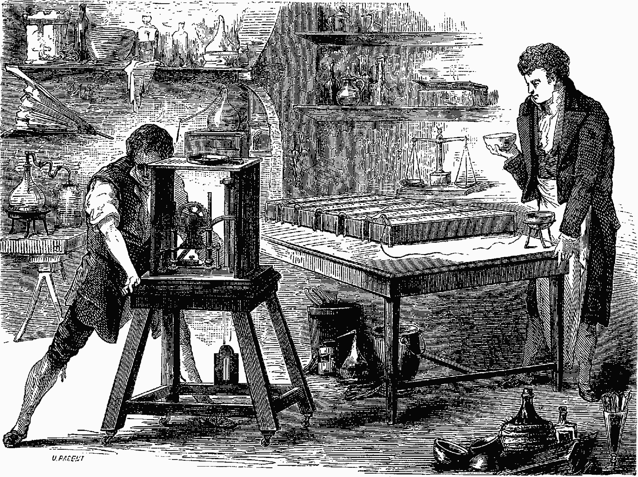 Davy décompose les alcalis par la pile voltaïque (1807)